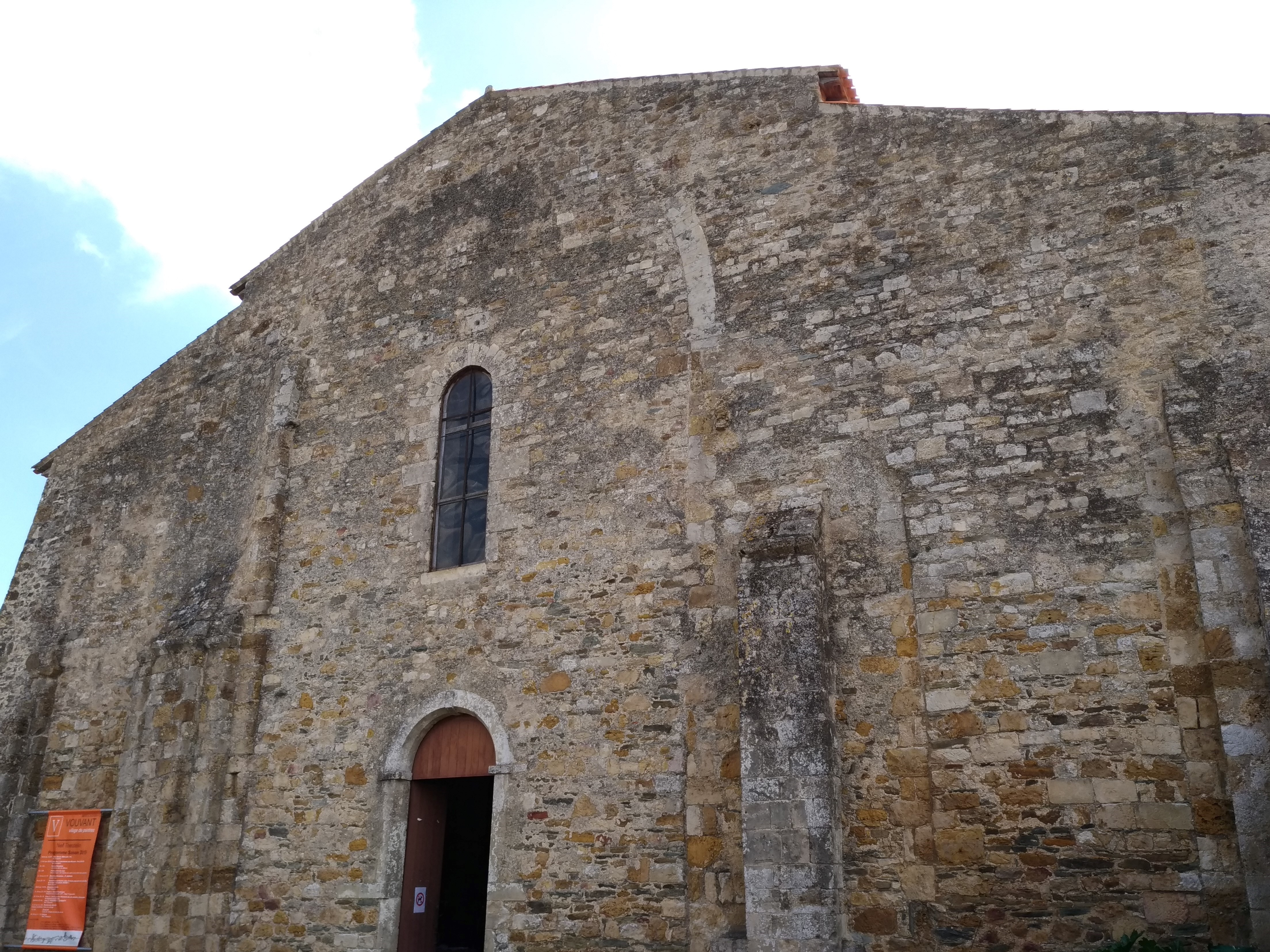 Façade ouest de la nef Théodelin (église Notre-Dame de Vouvant). Cette façade est édifiée au XVIIè siècle suite à la destruction du portail ouest de l'édifice.